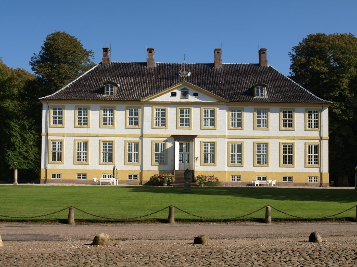 Dänemark, Fünen, Gut Hagenskov, Herrenhaus, Foto 2014